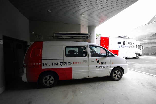 DIMA 동아방송예술대학교 SD와 HD 중계차